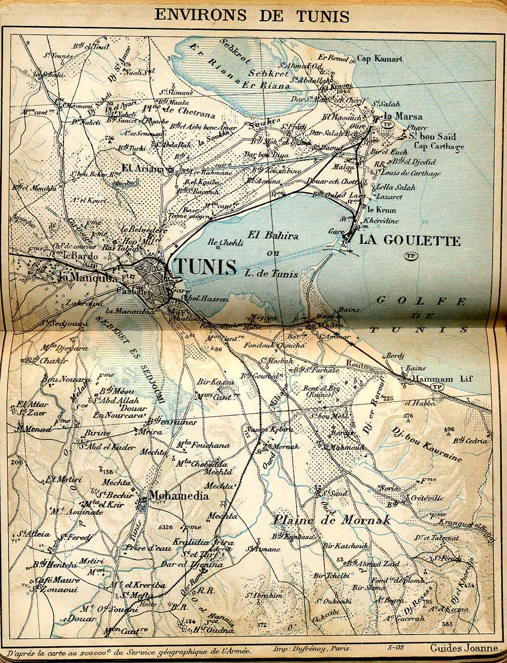 Plan de Tunis et ses environs en 1903, Tunisie